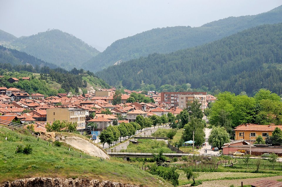 Елешница, Разлог ,Благоевград